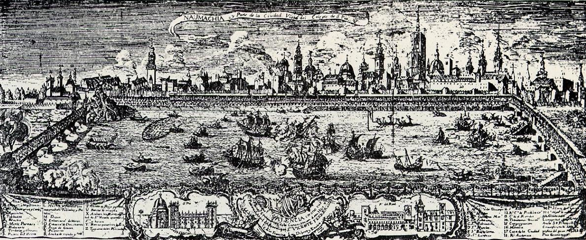 (Por Takio65 del foro de Urbanity) Esta es la naumaquia que se celebró en 1755 entre los puentes de la trinidad y del real, con motivo del centenario de la canonización de San Vicent Ferrer. Fué algo expectacular, con sus gradas y todo, con decenas de barcos algunos de gran tamaño y con los cañonazos de salvas y arcabuzazos resonando por toda la ciudad. Digamos "sellaron" el puente del real para que el agua alcanzara un nivel aceptable para que las embarcaciones pudieran navegar sin problemas. Algunas las tuvieron que llevar por tierra porque no cabían por debajo de los arcos. Una faena de chinos pero el resultado fué increible. Incluso hicieron falsas "montañas" como decorados. En las vistas inferiores del grabado se ve San Pio V y el desaparecido palacio Real. Y al otro lado, el fondo de decenas de campanarios de iglesias y conventos de la Valencia ilustrada. El grabado nos muestra a gran parte de la ciudad observando el acontecimiento desde sus tribunas y palcos, distribuidos por los pretiles y los puentes entre los cuales se desarrolla la celebración del centenario, el del Real y el de la Trinidad, todo ello captado desde el San Pío V, representado, junto al palacio Real, en la parte inferior de la imagen. El río fue represado con un azud de tablones y estacas, bajo los puentes del Real para obtener un estanque de orilla a orilla ya que ya entonces normalmente el río bajaba bastante seco aunque se usaba en ocasiones para transporte de troncos desde las montañas hasta el mar. Con 42 embarcaciones, algunas de ellas de tres mástiles y por la abundante presencia de agua en el río, supongo que la imagen estará exagerada pero no debió dejar un acontecimiento para la época. (Por Takio65 del foro de urbanity)